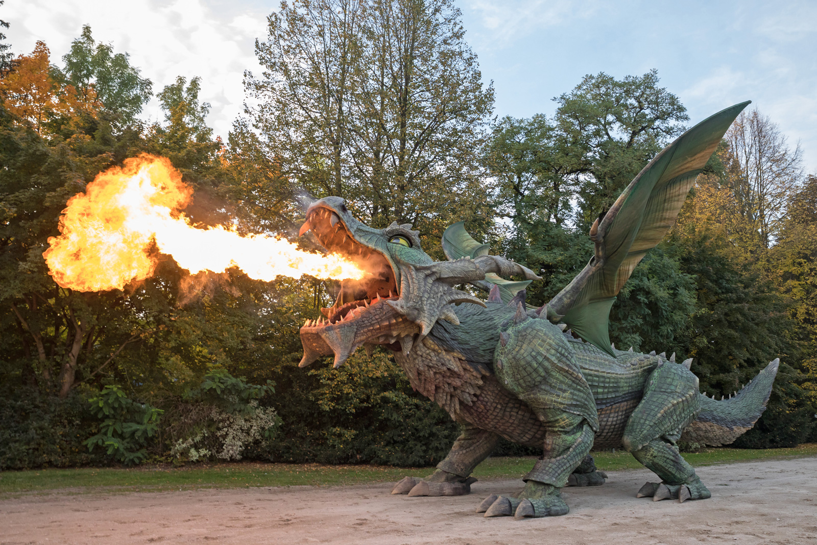 Der Further Drache ist der größte vierbeinige Schreitroboter der Welt